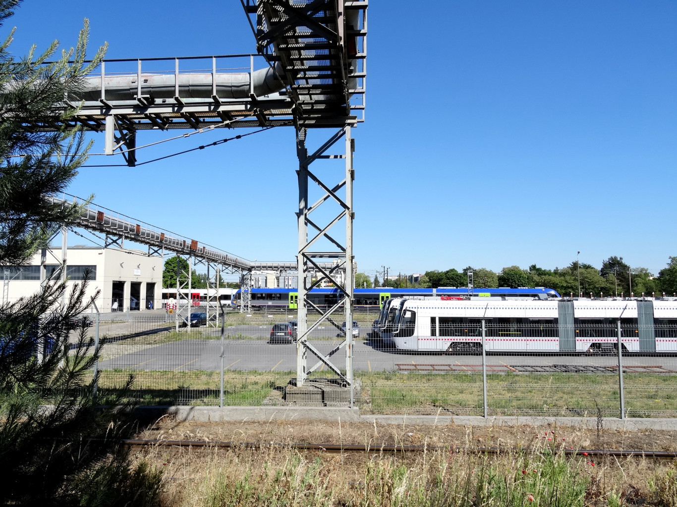 Pojazdy Szynowe PESA Bydgoszcz S.A., autobusy szynowe przy ul. Ludwikowo